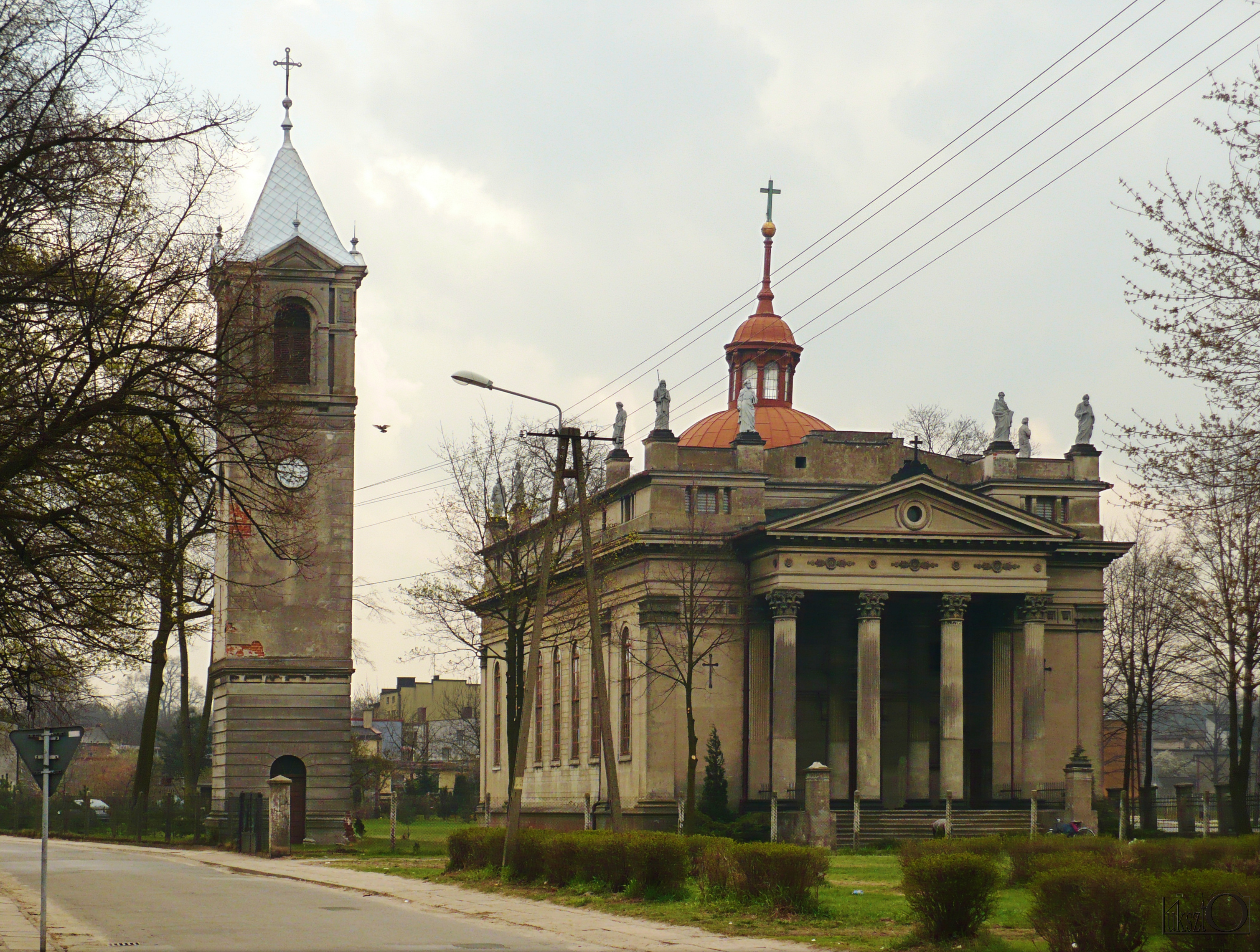 Ozorków, Kosciół ewangelicko-augsburski pw. Dwunastu Apostołów Jezusa Chrystusa 1842